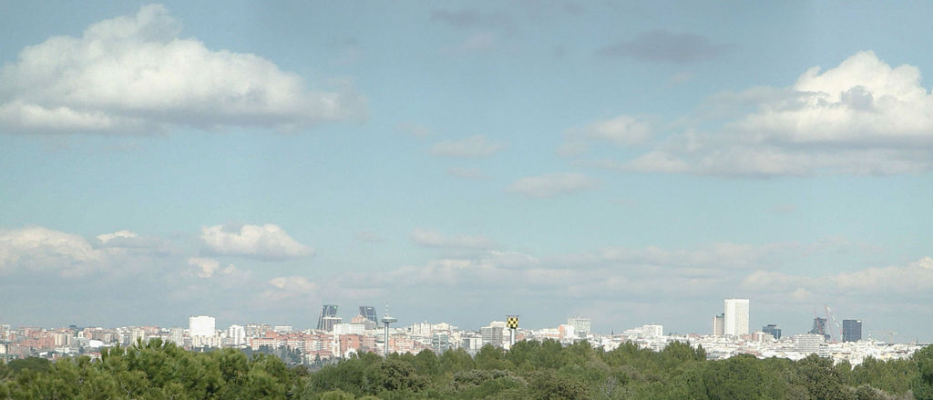 Madrid skyline picture from La Casa de Campo (18/02/2005)